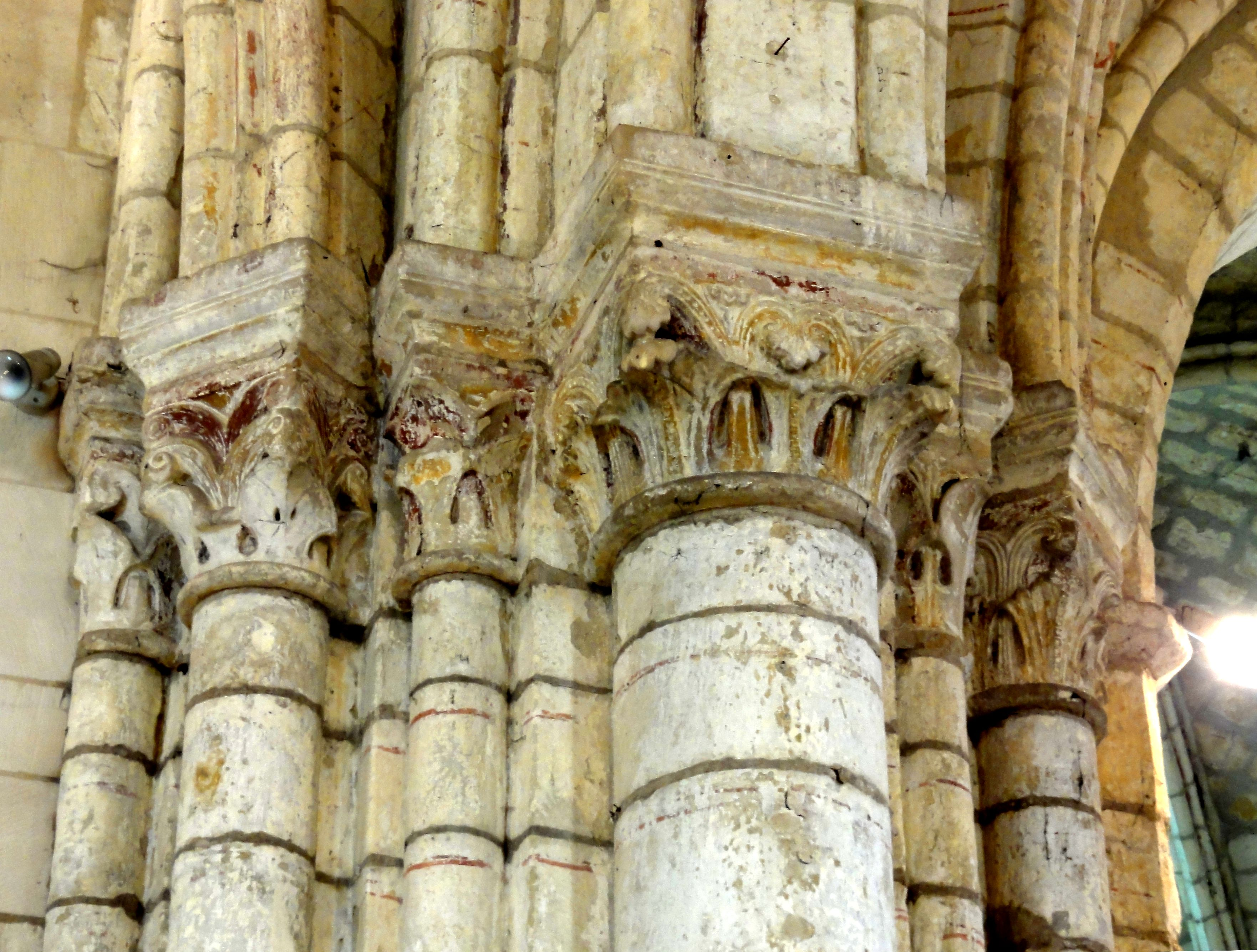 Abside, arcade vers la croisée, chapiteaux côté sud.